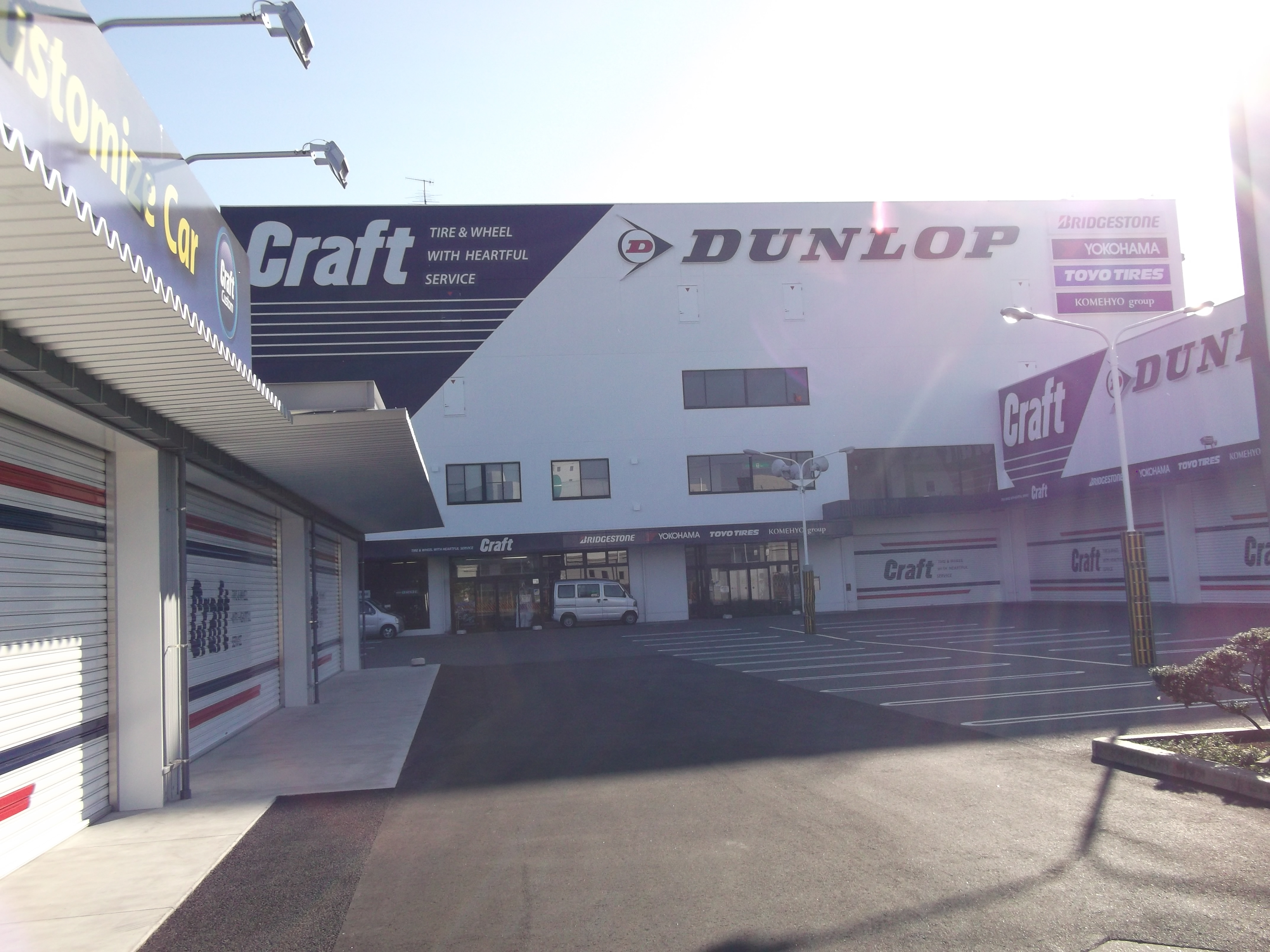 名古屋市中川区広川町のクラフト本社を北側公道より撮影